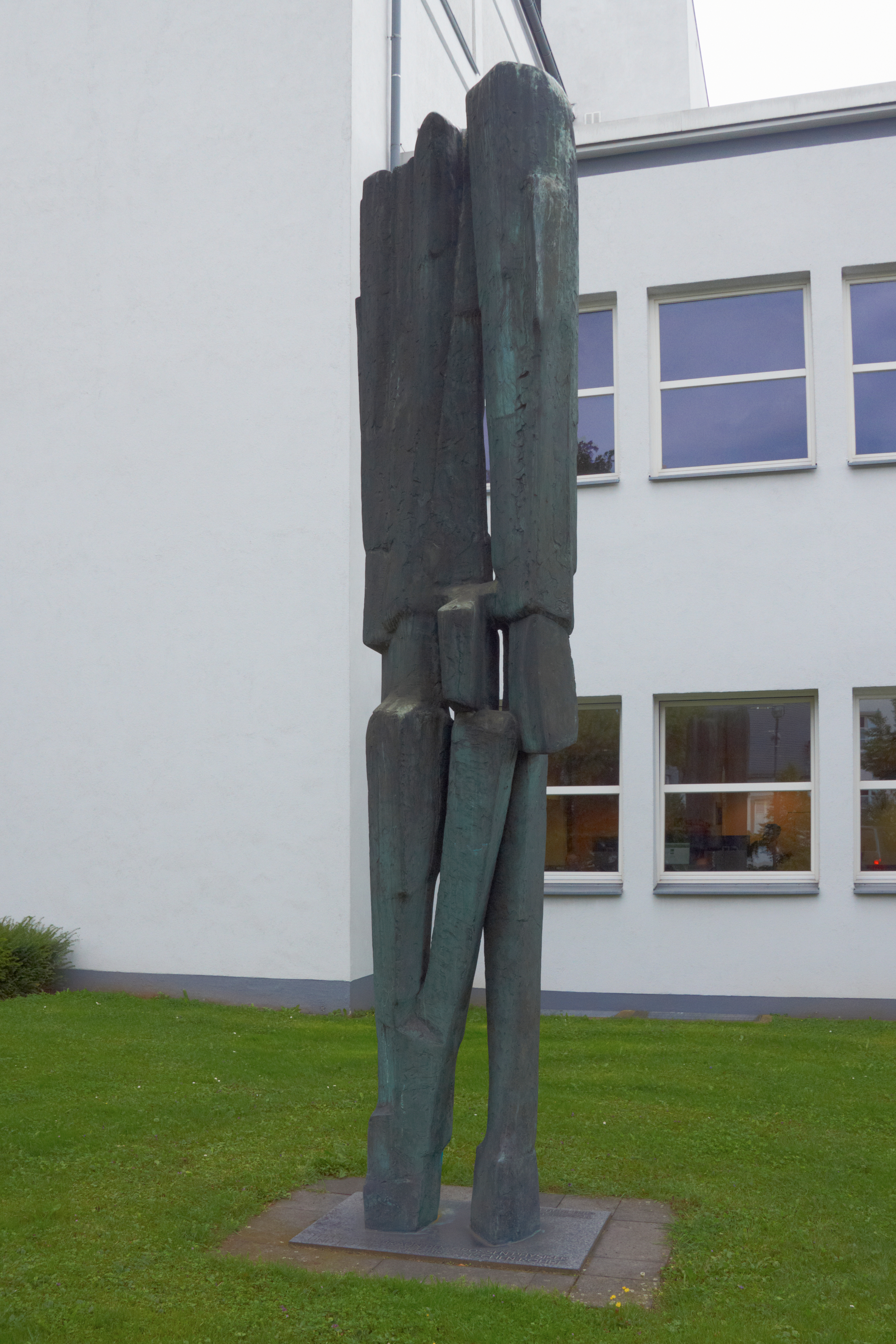 am 27.10.1971 enthülltes abstraktes Denkmal zu Ehren des Physwikers Ferdinand Braun vor der Landesbibliothek in Fulda